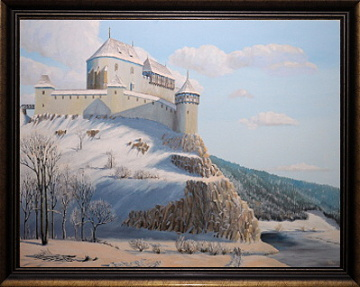 Hrad Zbořený Kostelec, olej na plátně 94x72 cm